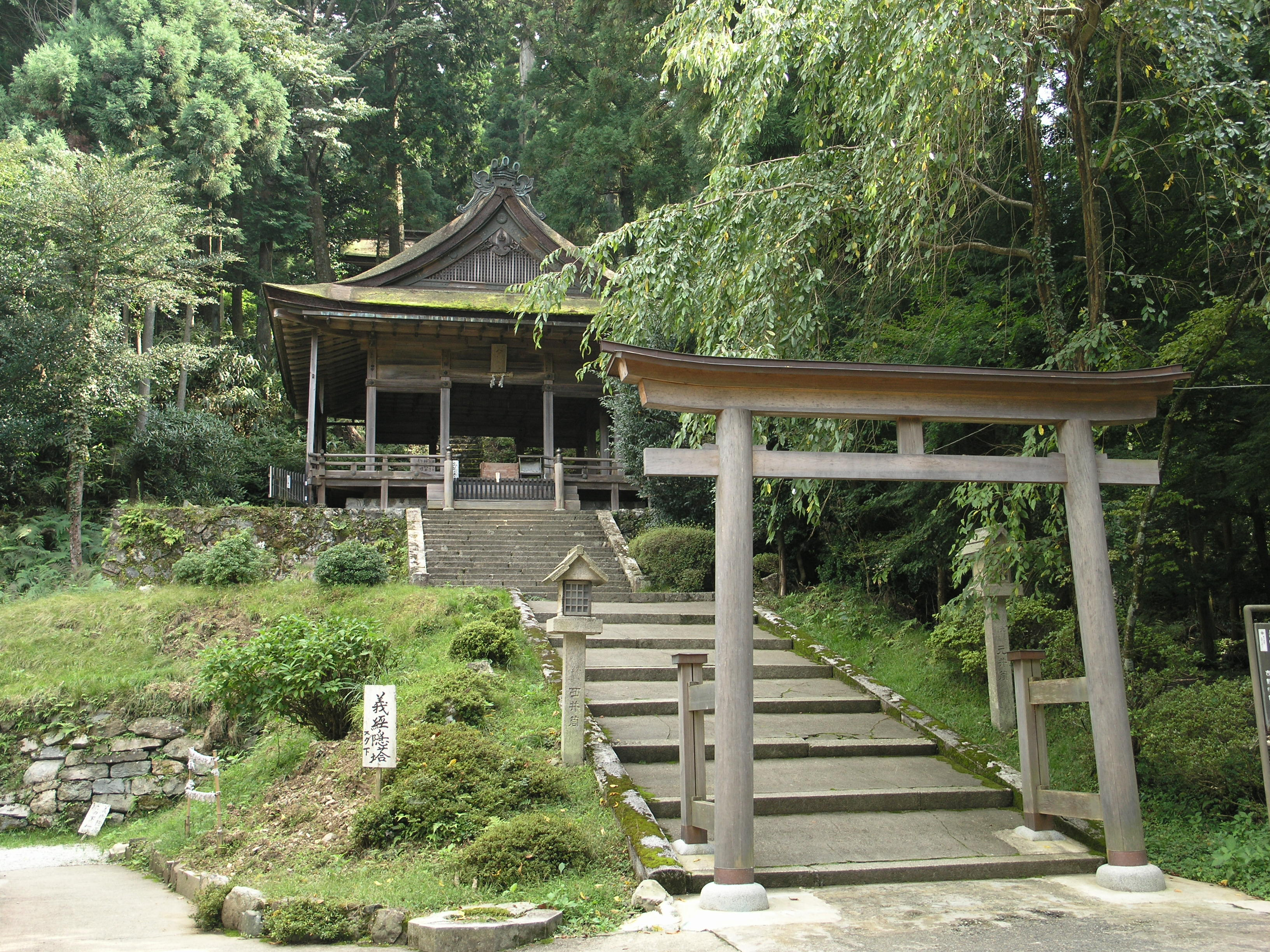 金峯神社 拝殿 (奈良県吉野郡吉野町) 2008年9月撮影。 機材：C8080WZ 撮影者：Kansai explorer